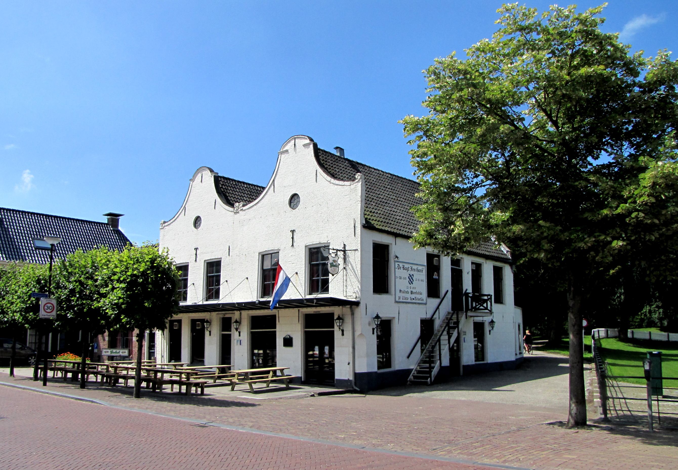 Franeker, Cafe de Bogt